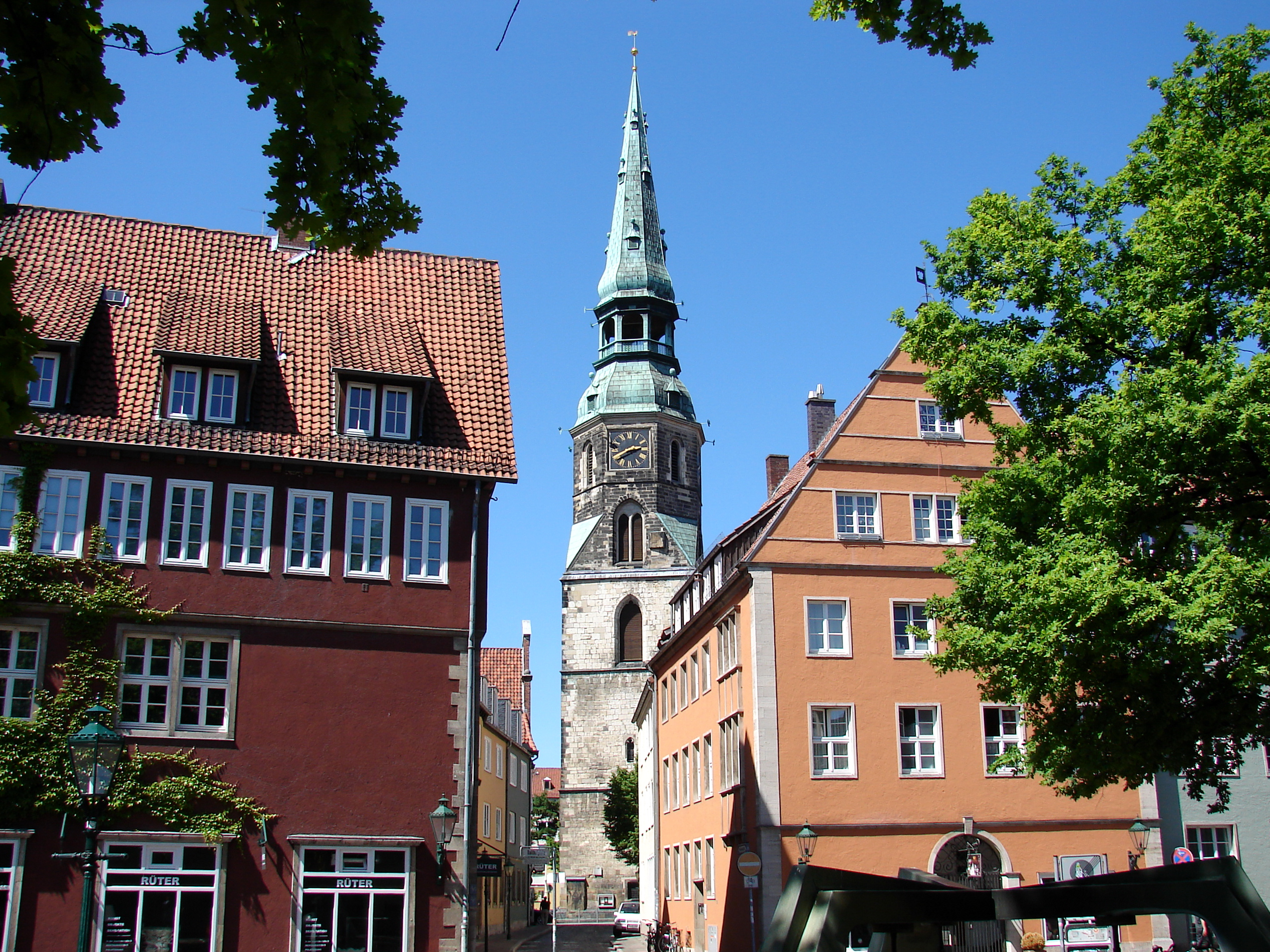 Kreuzkirche Hannover